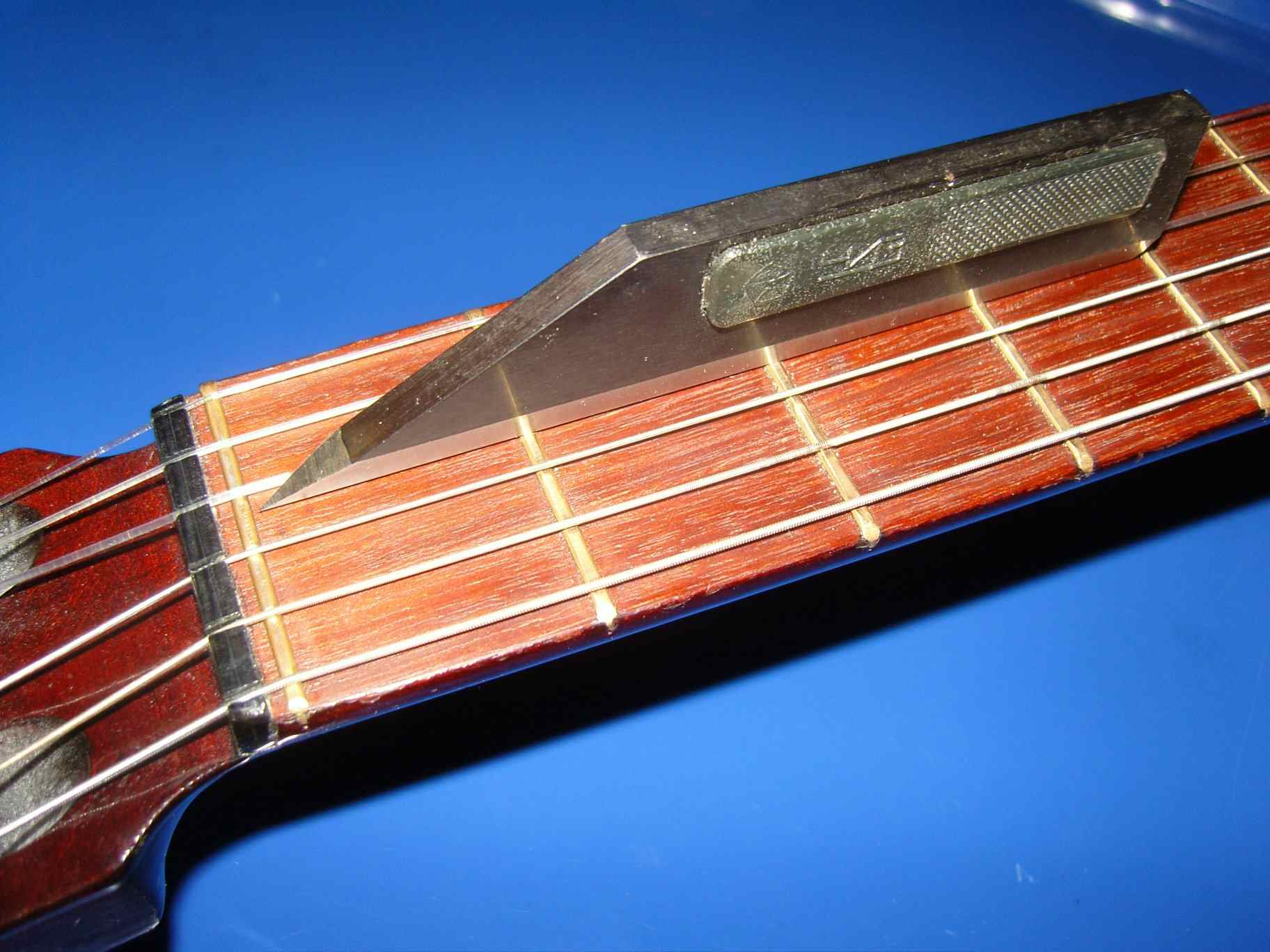 Prüfung der Höhe des "nullten Bundes"